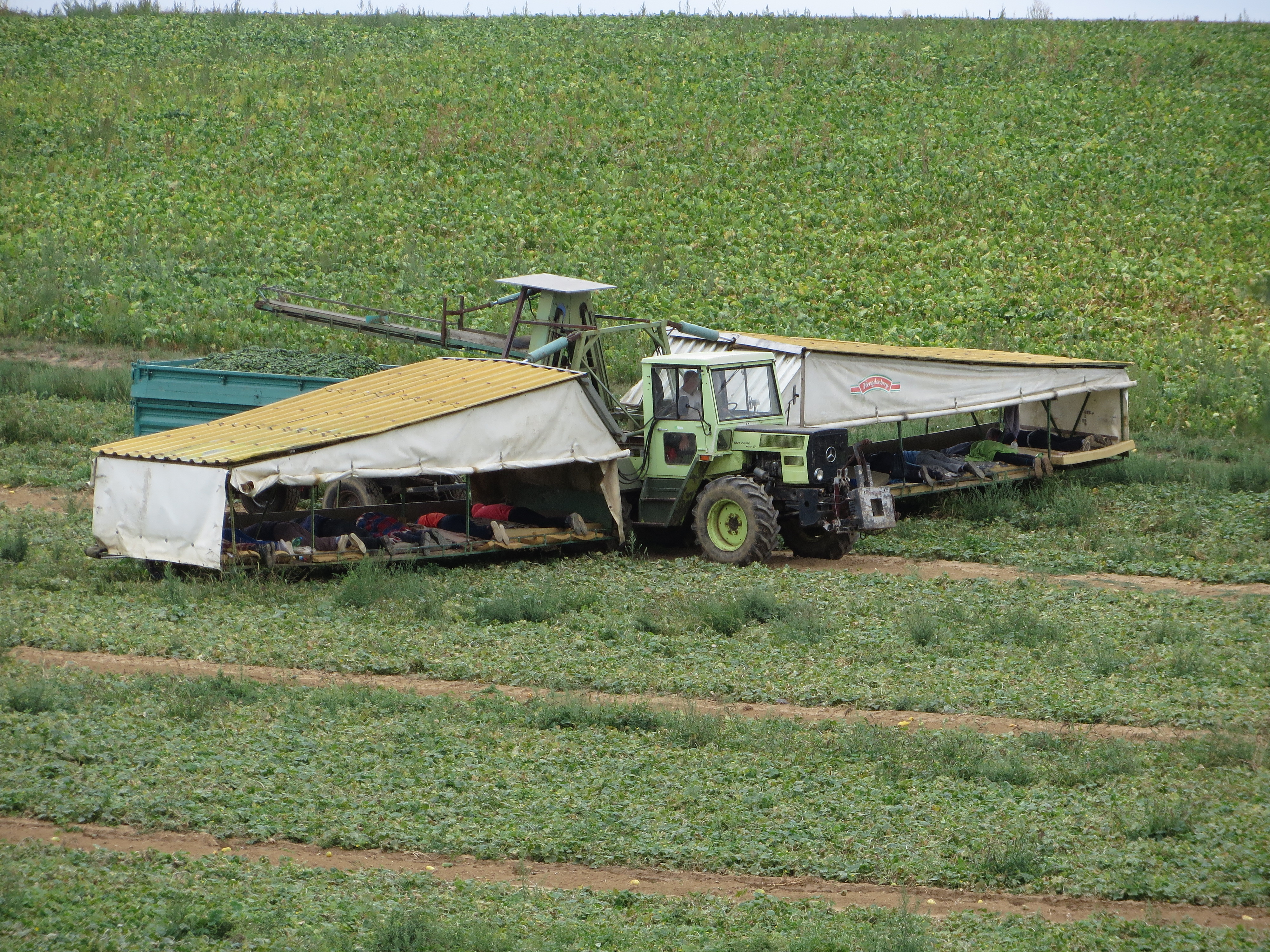 Sogenannter Gurkenflieger im Einsatz auf einem Feld in Bad Friedrichshall-Untergriesheim